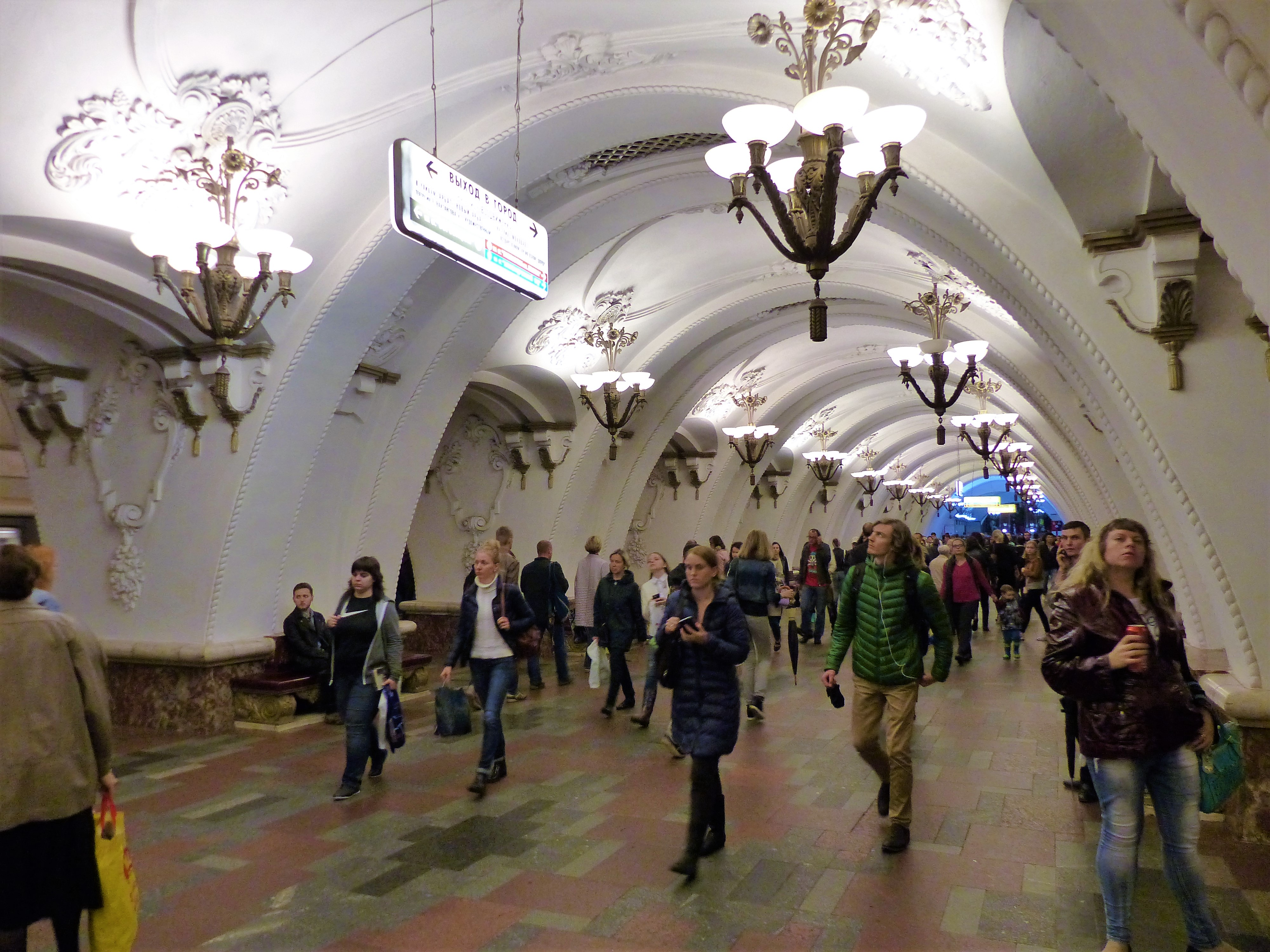 Parada de metro Arbatskaya, verano del 2016